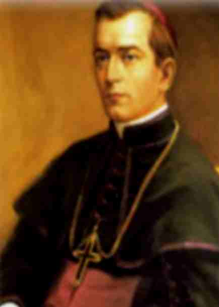 Stephan Novak, 1905-1932, Griechisch-katholischer Bischof von Prešov (1913-1918)